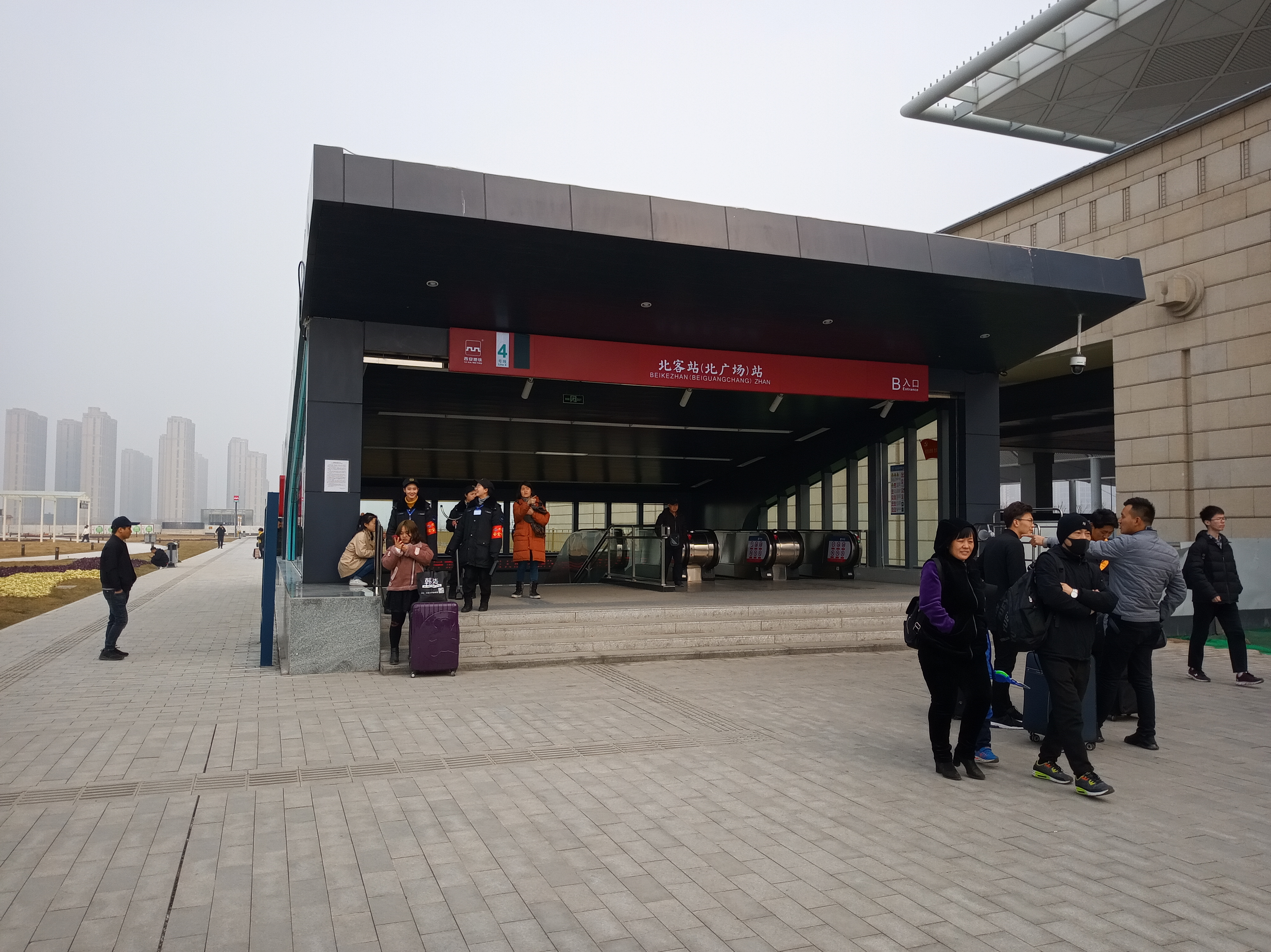 西安地铁四号线北客站北广场站地下一层和两个出入口